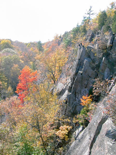 Indian Summer im Sleeping Giant State Park, Hamden (Connecticut), USA